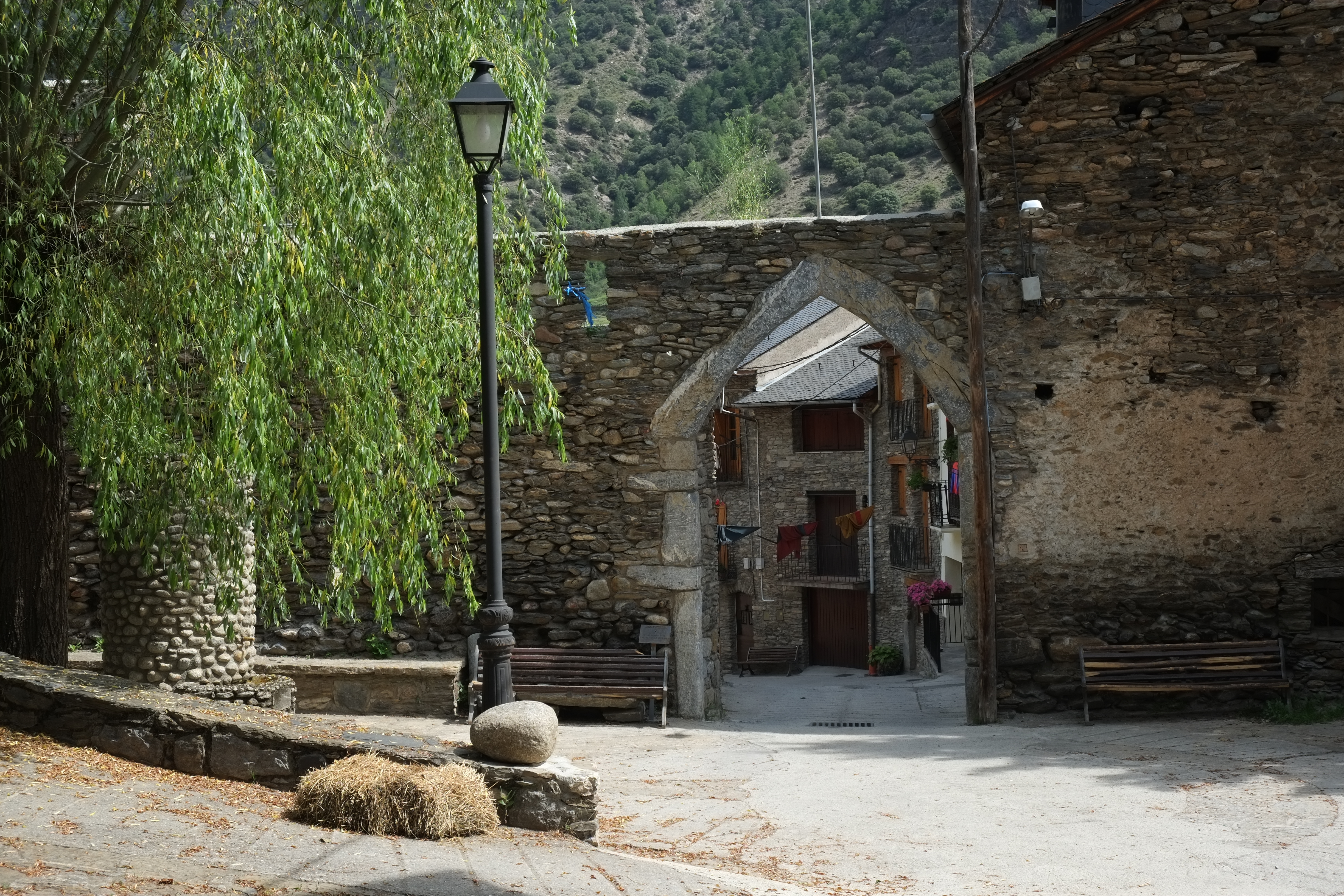 Escaló, ein Ortsteil der Gemeinde La Guingueta d'Àneu in der Provinz Lleida (Spanien)